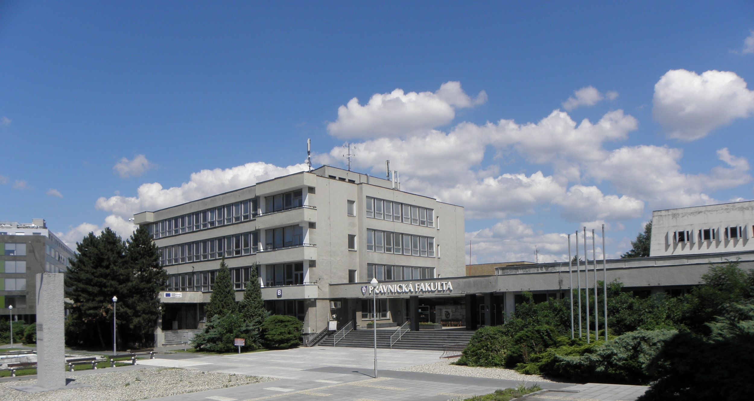 Budova Právnické fakulty UP Olomouc